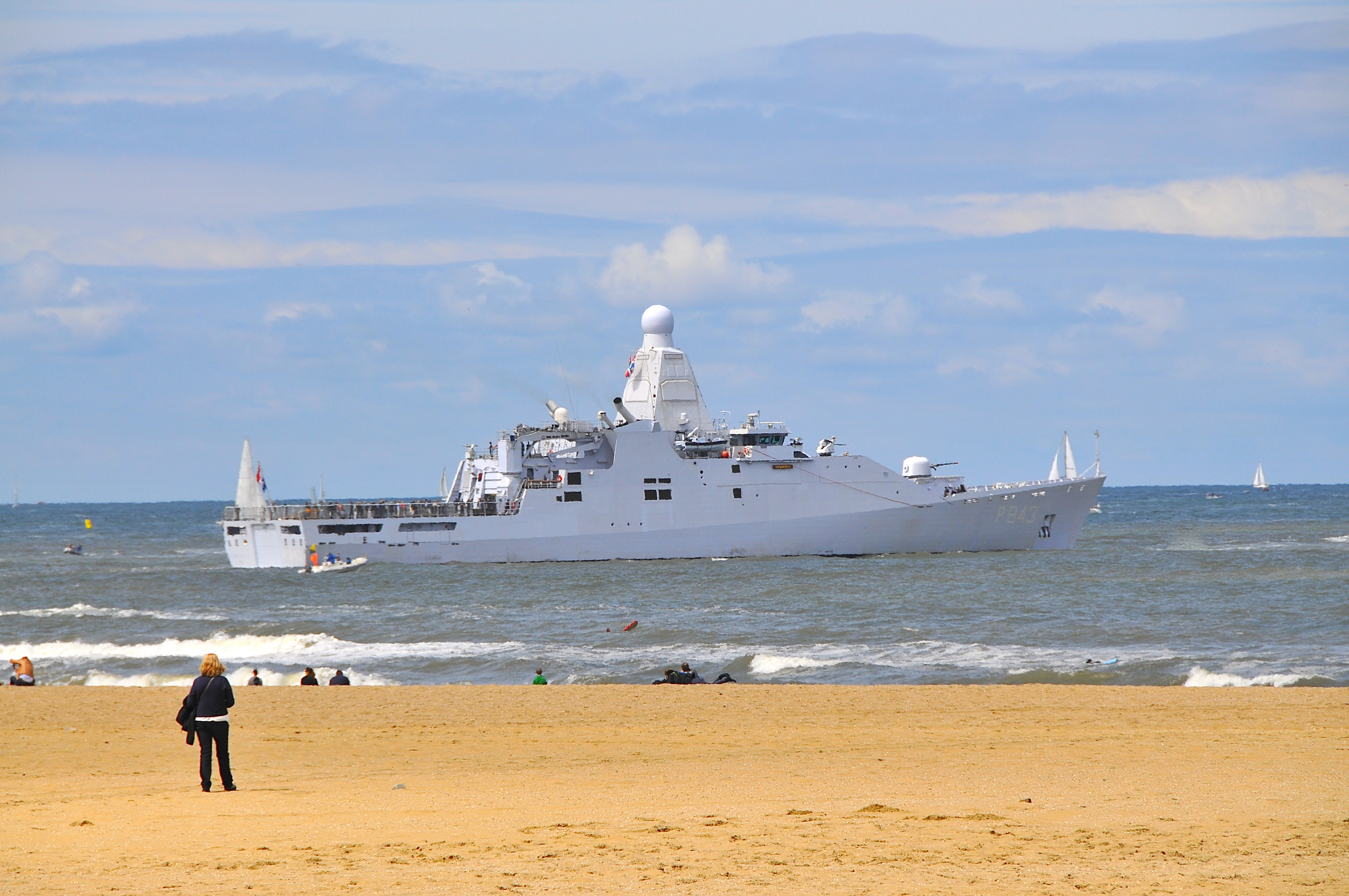 Ter gelegenheid van het feit, dat de Volvo Ocean Race de haven van Scheveningen aan deed, was de Marine aanwezig met het patrouilleschip Groningen. Ocean-going Patrol Vessel van de Holland-klasse. Kiel gelegd 9 april 2009. Te water gelaten 21 april 2011. In dienst gesteld 29 november 2013. Het schip is grotendeels in Roemenië gebouwd. De patrouilleschepen van de Holland-klasse zijn inzetbaar voor veel taken zoals antipiraterijmissies, counterdrugsoperaties en kustwachttaken. Bron